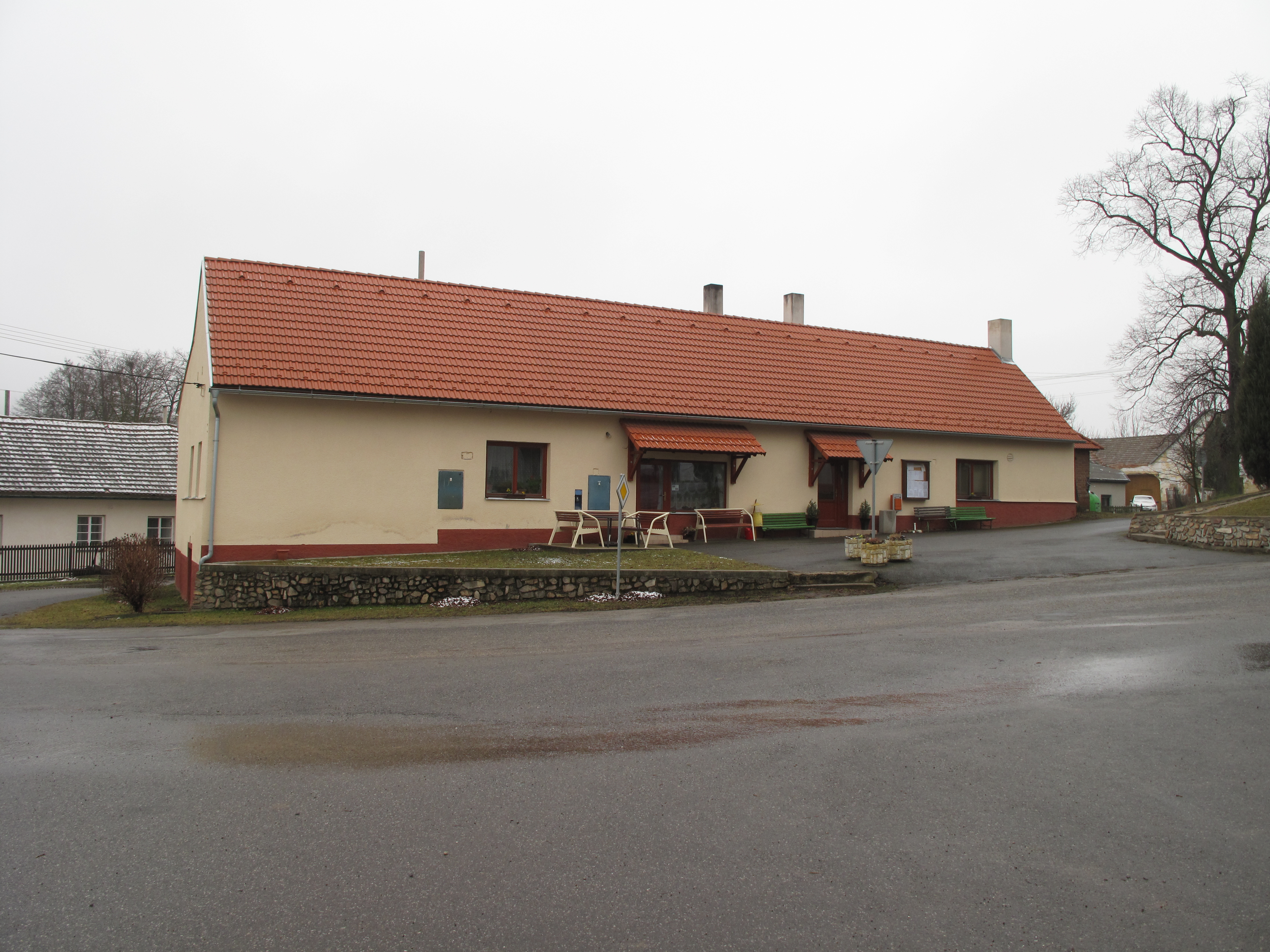 Obecní úřad v Kváskovicích. Okres Strakonice, Česká republika.